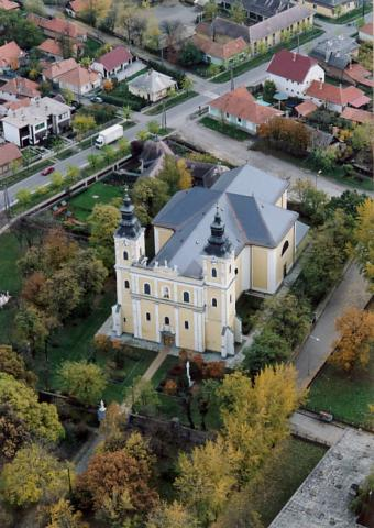 Jászapáti, Hungary, aerialphotography